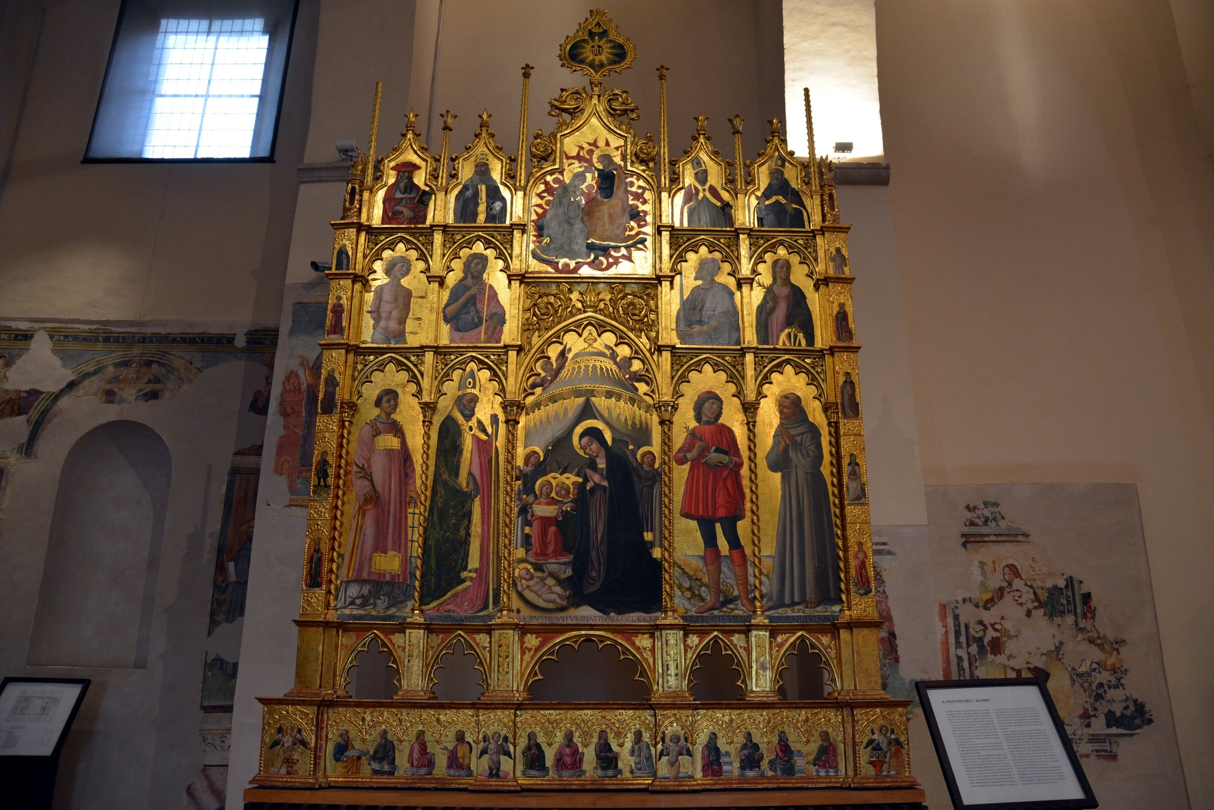 Pinacoteca comunale, Polittico dell'Alunno This is a photo of a monument which is part of cultural heritage of Italy.